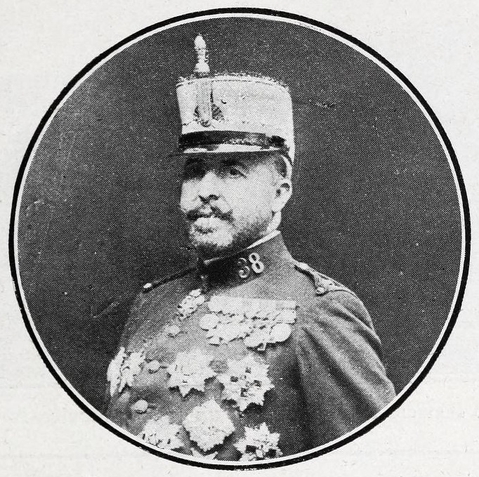 El general Aguilera, jefe de la columna que ocupa el zoco El-Arbay que ha realizado brillantes operaciones. Fot. Kaulak